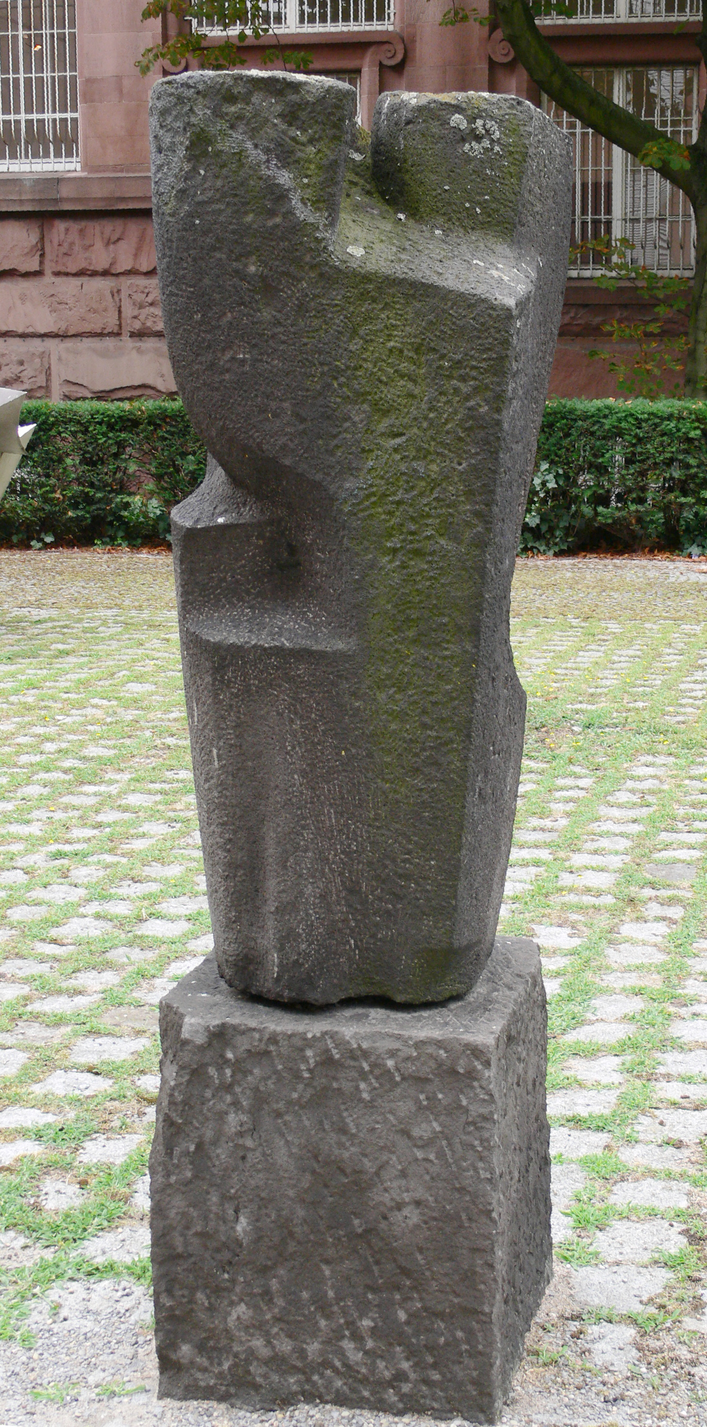 Kunsthalle Mannheim, Skulpturengarten Morice Lipsi (1898–1986): Tektonisch, 1958, Vulkangestein